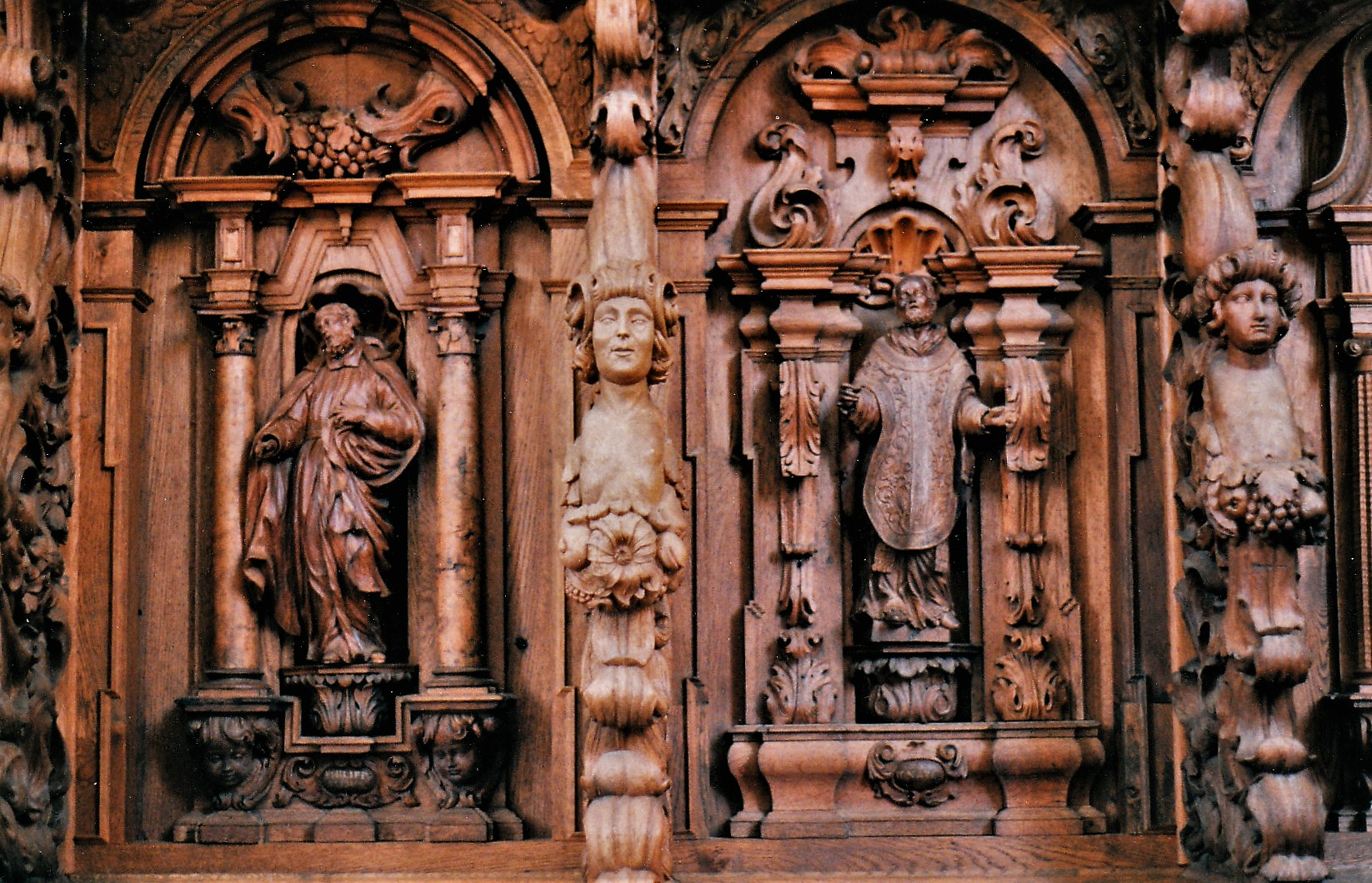 St. Maria (Buxheim): Chorgestühl von 1691, Südseite